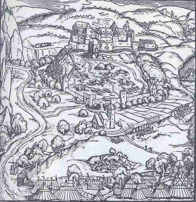 Ebernburg bei Bad Münster am Stein, Stich nach Conrad Faber in der Livius-Ausgabe bei Schöffer, Mainz 1523